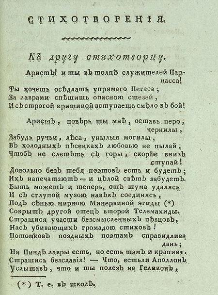 Первое напечатанное стихотворение А. С. Пушкина (журнал "Вестник Европы", 1814, № 13)